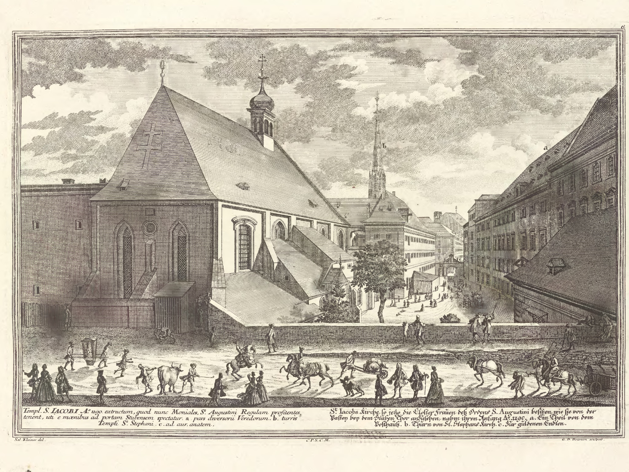 Jakobskirche im Stubenviertel. Stich von Georg Daniel Heumann nach einer Zeichnung von Salomon Kleiner (1724). Wien Museum